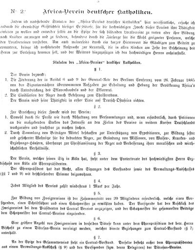 Erste Satzung des Afrika-Vereins deutscher Katholiken